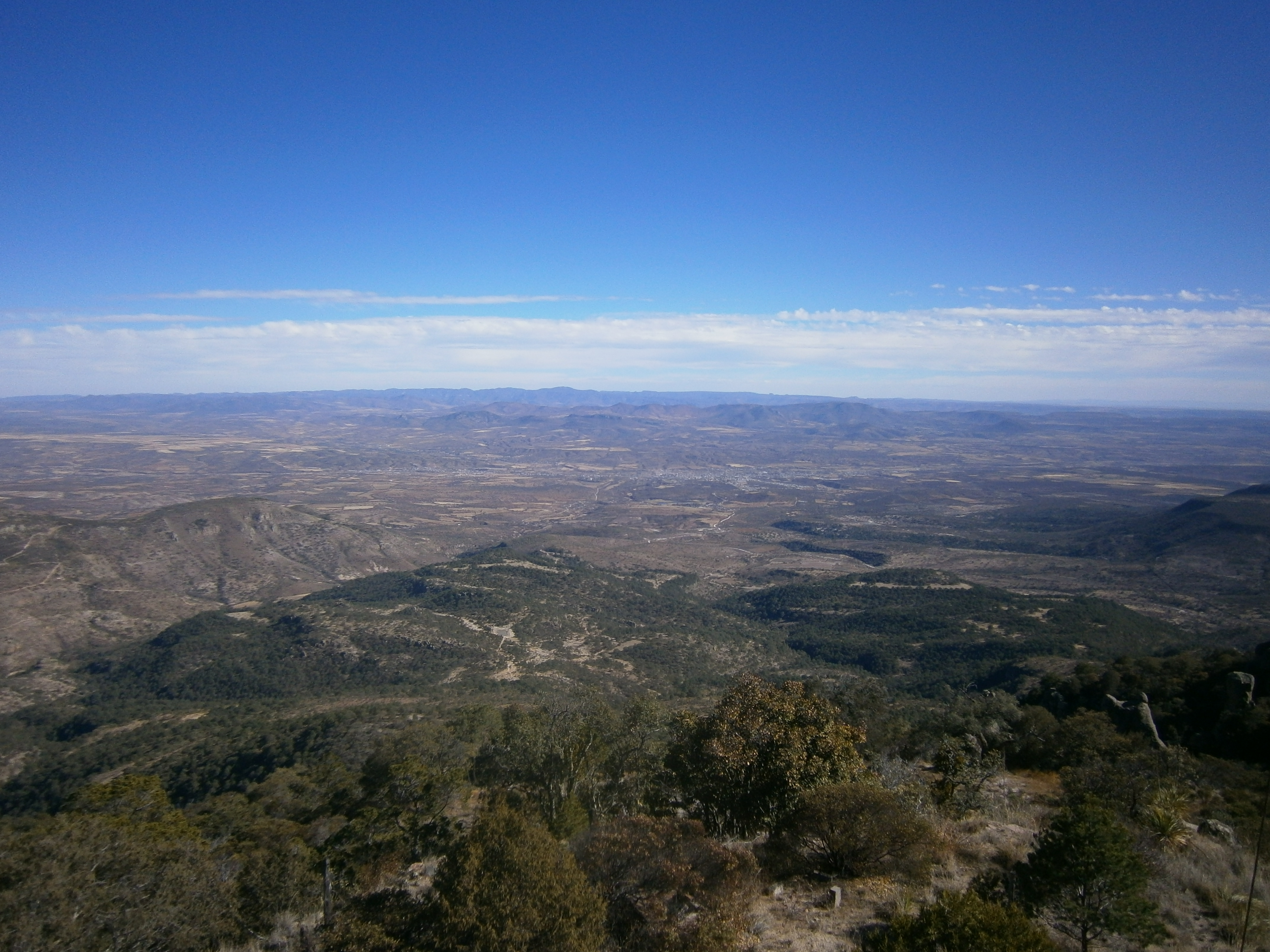 Vista desde el cerro de la lechuguilla del Valle de Valparaiso